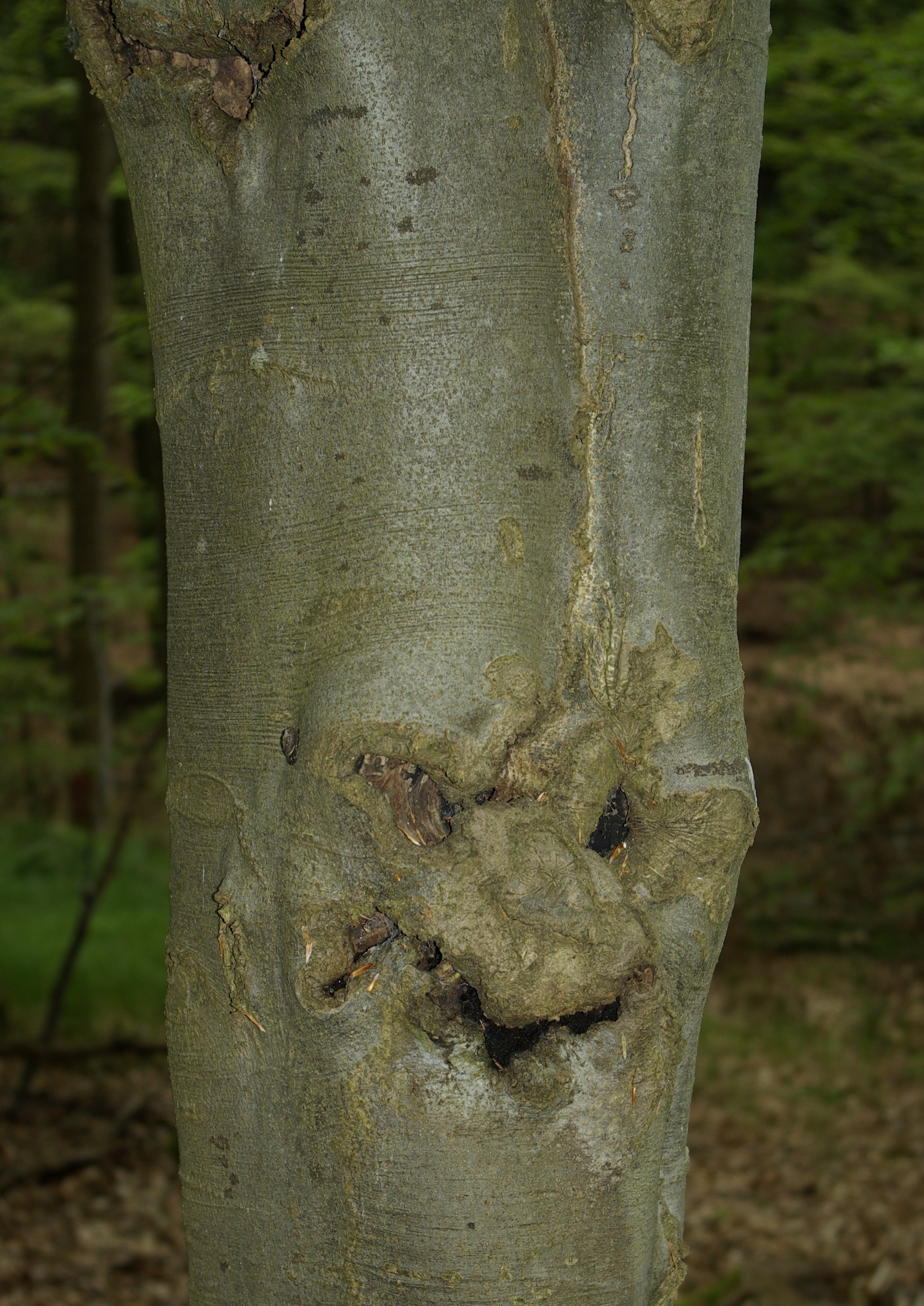 Mulmhöhle am Stamm einer Rotbuche im Geschützten Landschaftsbestandteil Der Hohe Buchene Wald im Ebracher Forst im Steigerwald